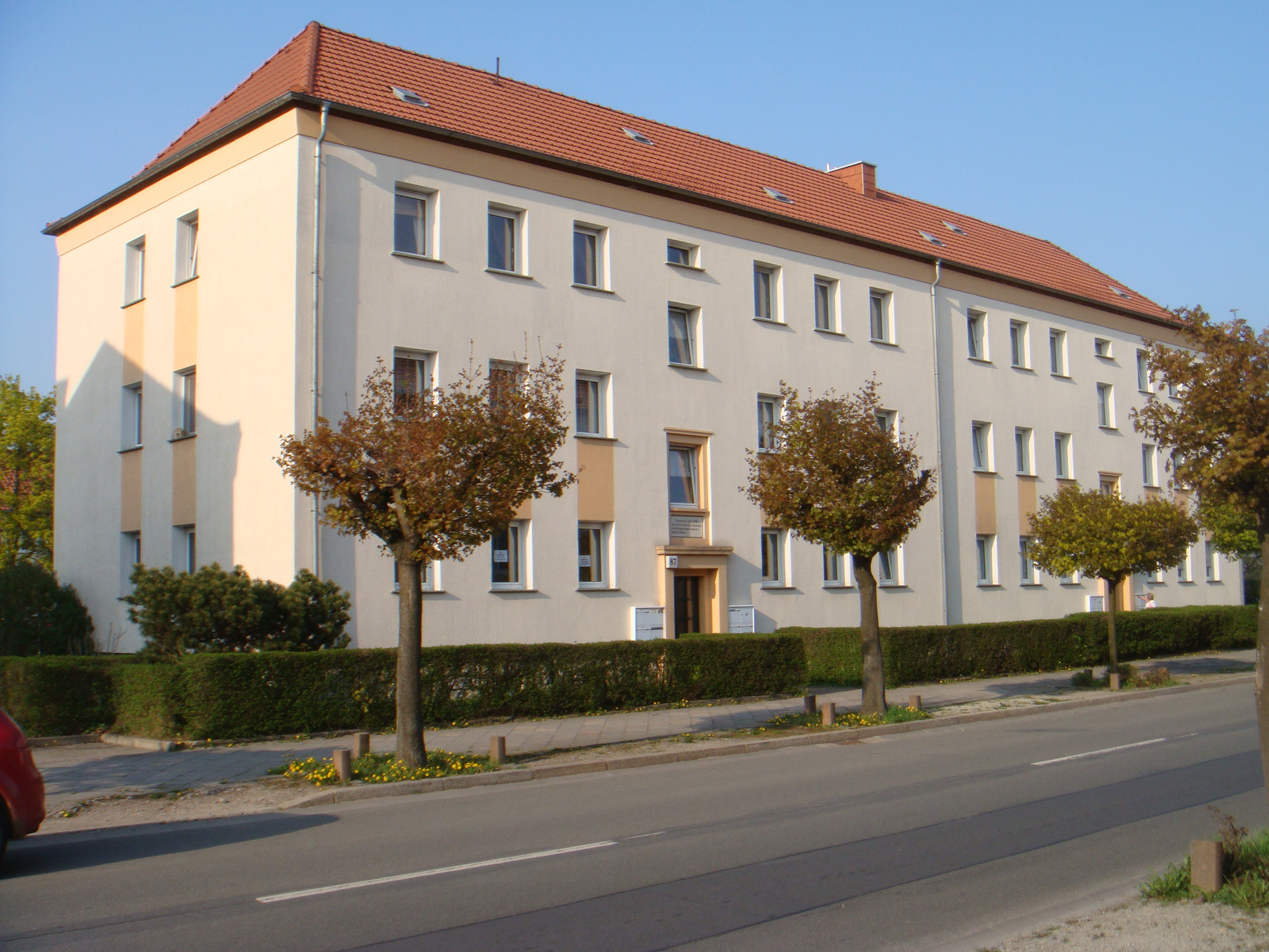 Wohnhaus der Arbeiter-Wohnungsbau-Genossenschaft Utenbacher Straße